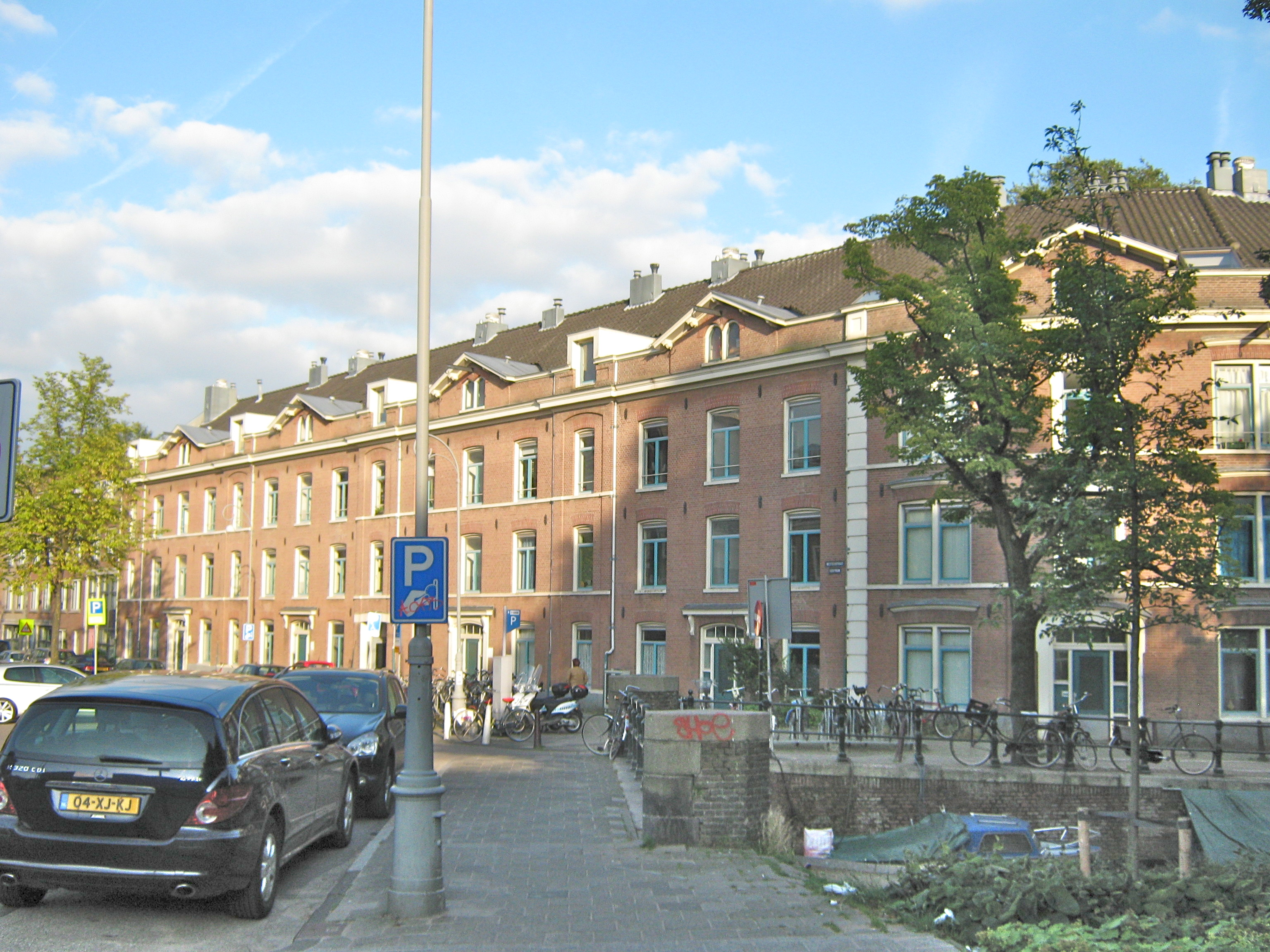 Gebouwd door H.S. van Lennep in 1862, ondergebracht in Bouwmaatschappij Concordia in 1864